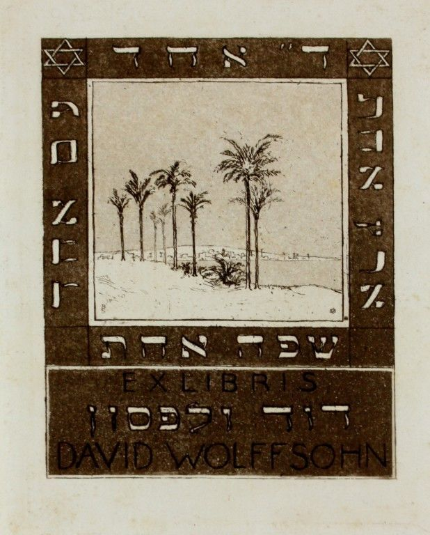 אקס-ליבריס של דוד וולפסון (1913), תצריב ואקווטינטה, גובה 17.1 ס"מ, רוחב 10 ס"מ